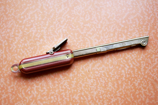 IMCO "Funkmeister" Gasanzünder